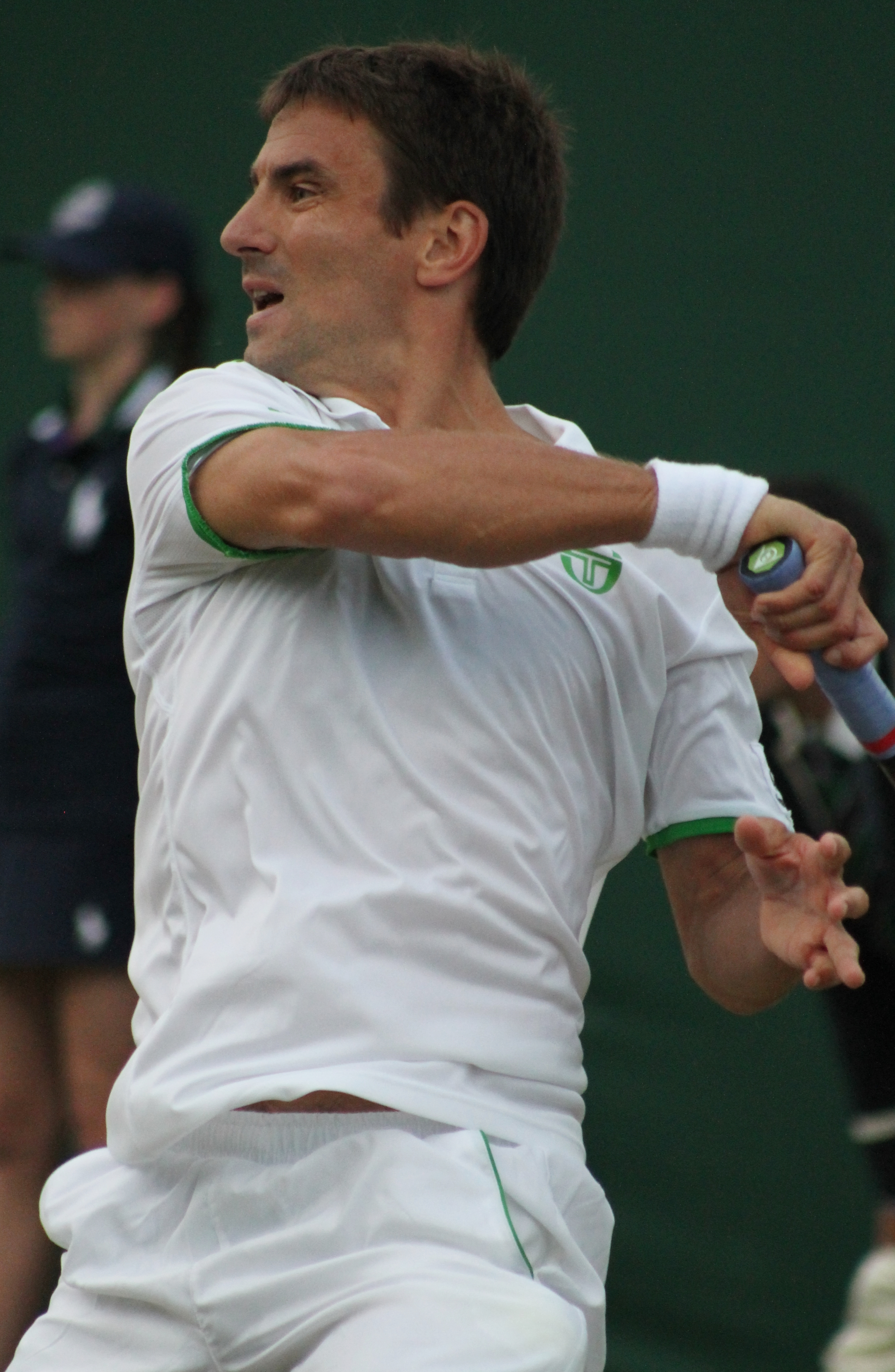 Robredo WM14 (20)